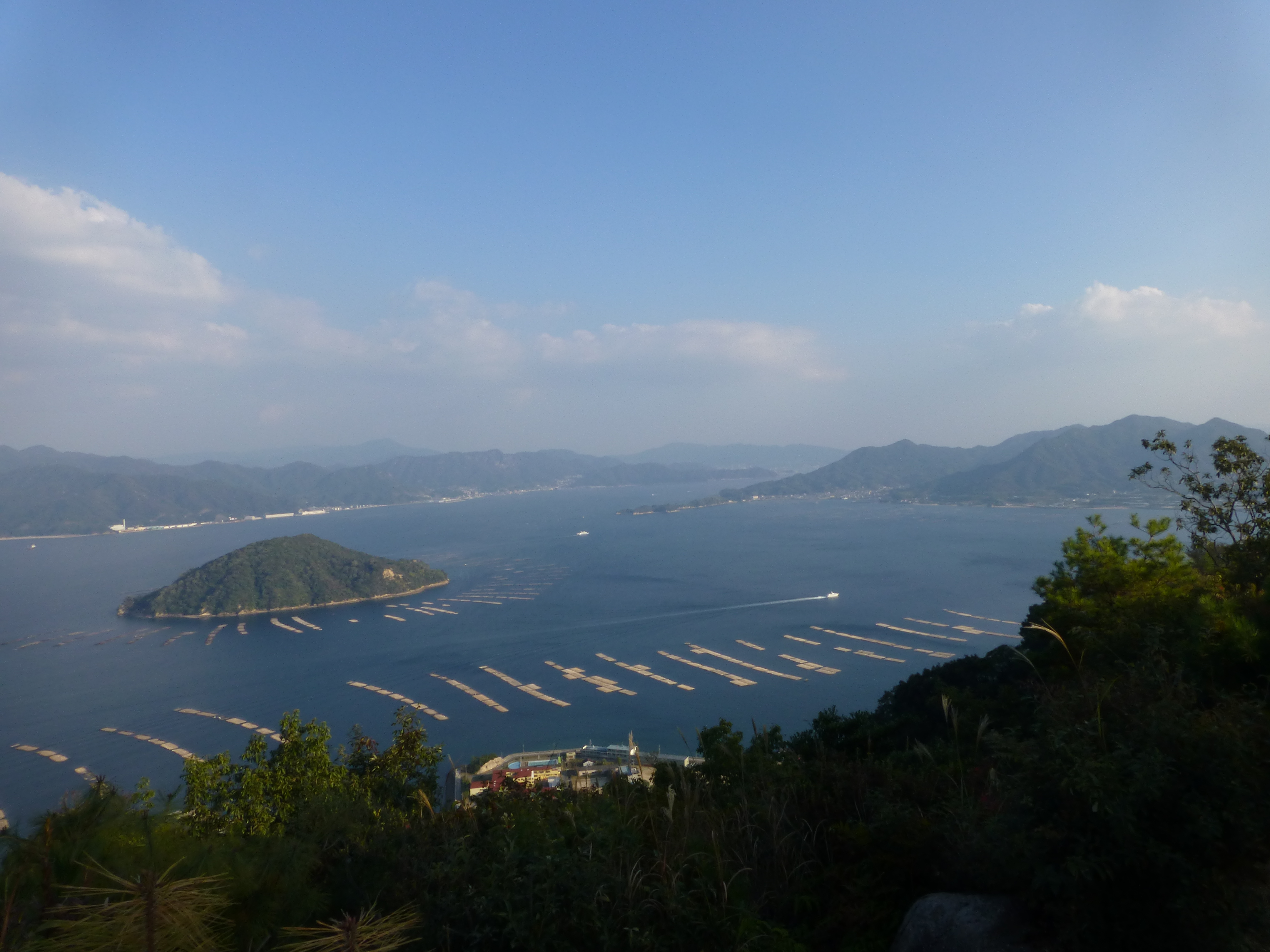 Oyster farms